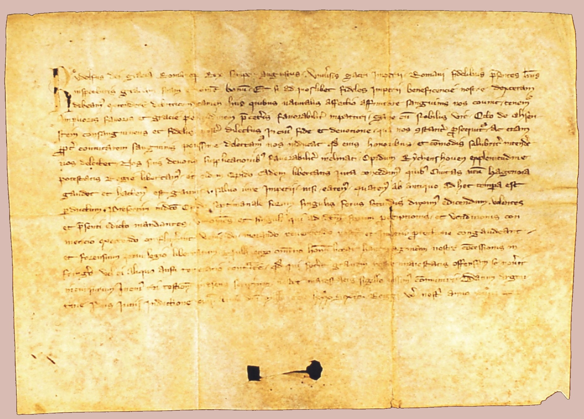 La charte de 1286 faisant de Reichshoffen une ville. Une copie est exposée au Musée Historique et Industriel - Musée du Fer de Reichshoffen.